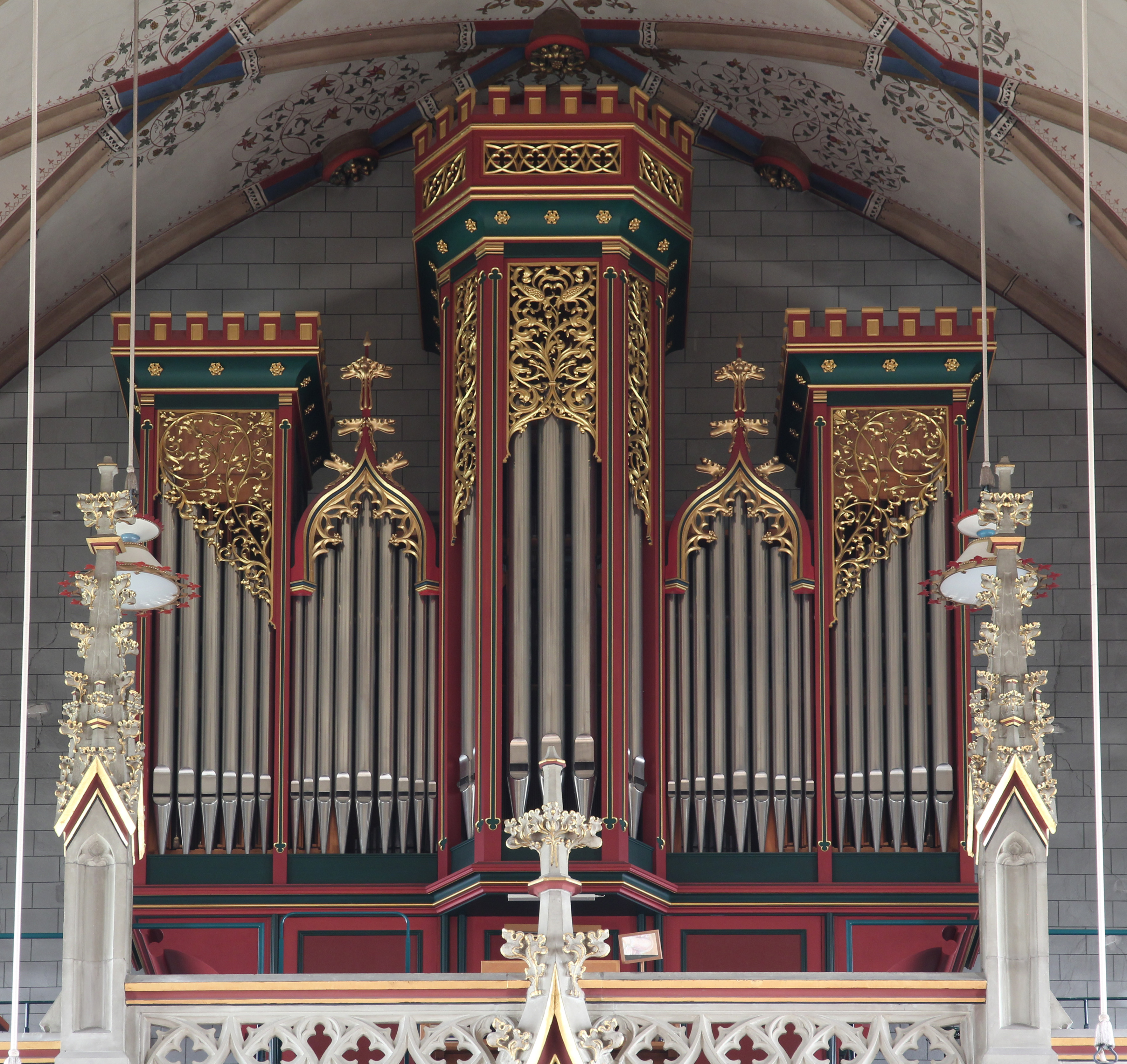 Römisch-katholische Pfarrkirche St. Peter und Paul Winterthur-Neuwiesen, Orgel